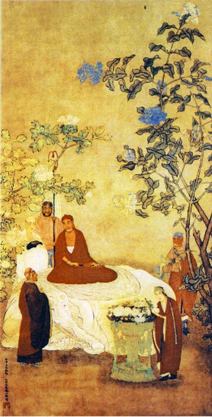 Portrait du Bouddha, rouleau mural, encre et couleur sur soie, 146,2x76,3 par le peintre chinois Wu Bin, Template:Sp-. Actif: 1573-1620. Musée du palais impérial, Beijing.